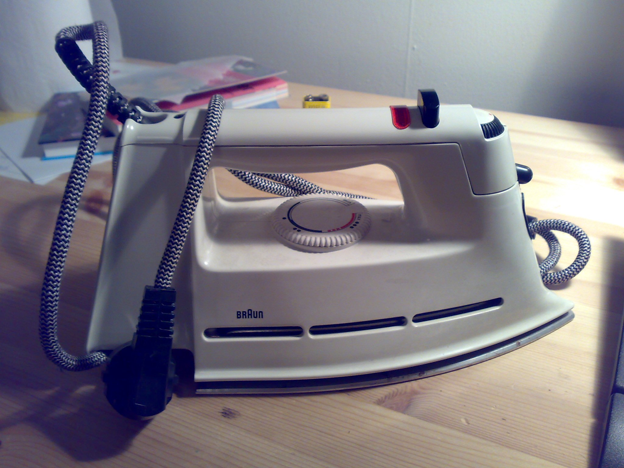 Iron, strykejern, Braun